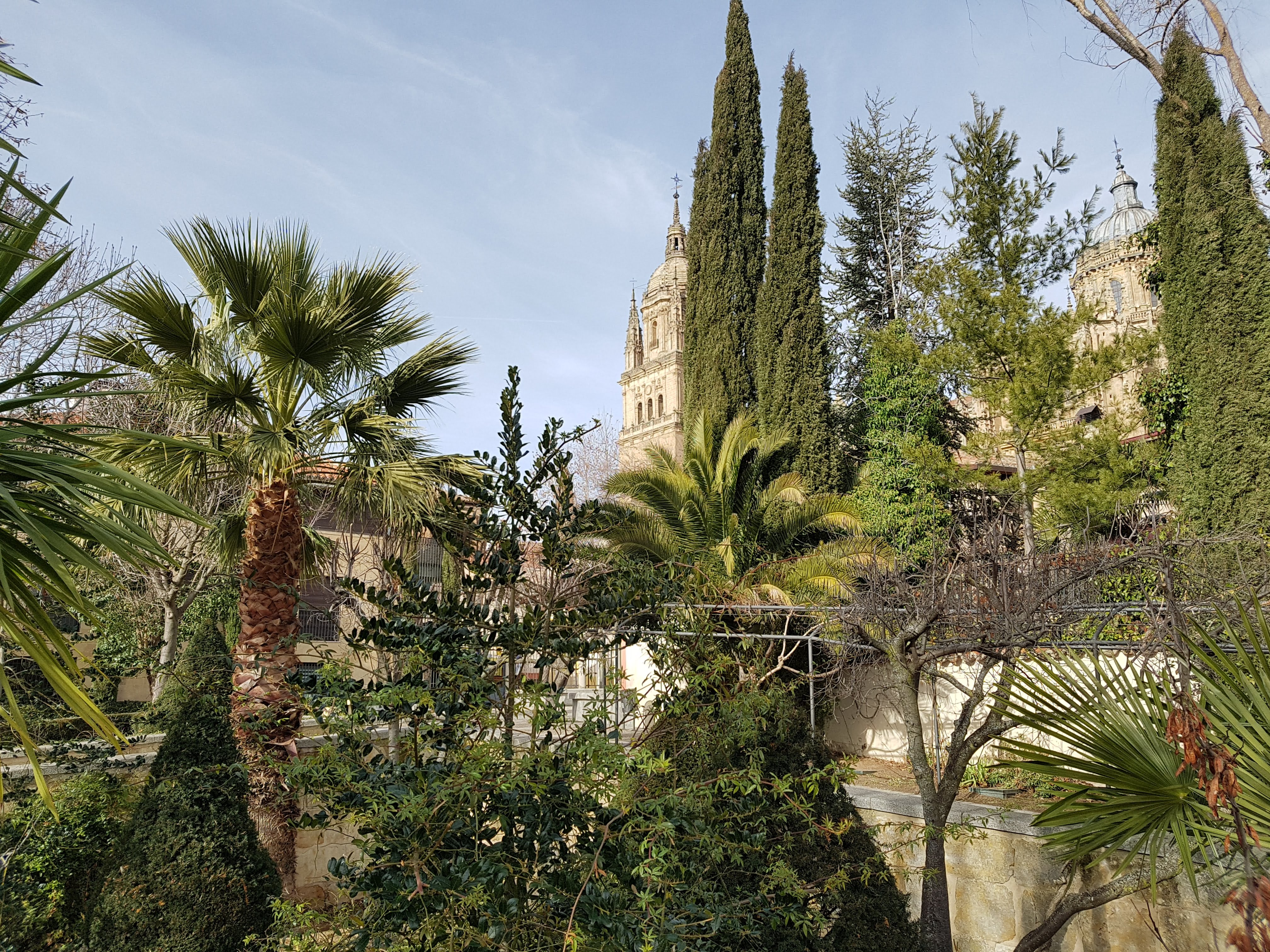 Vista de las torres de la Catedral Nueva desde el Jardín del Visir.